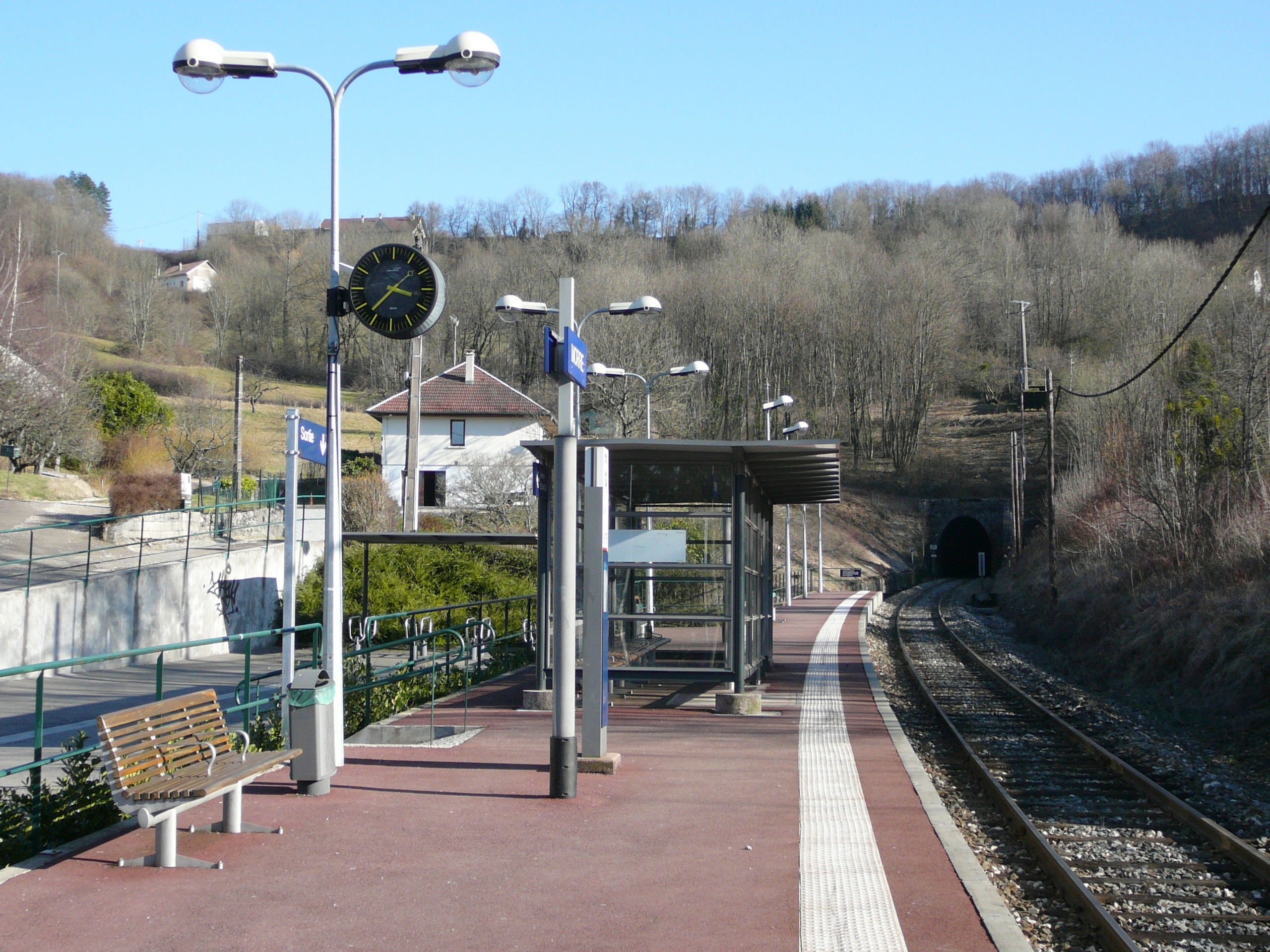 Vue de la halte de Morre en direction de Saône